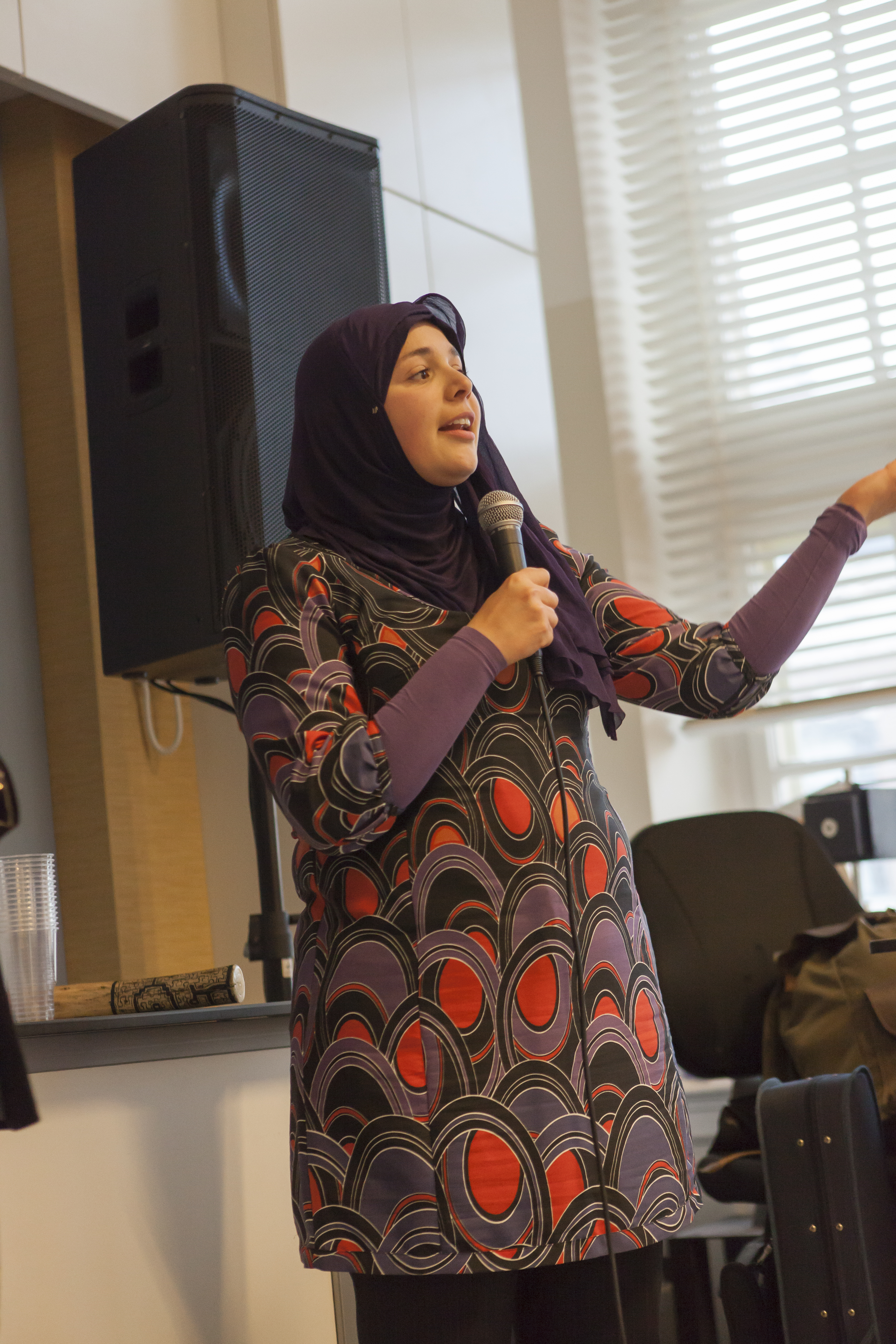 Esmaa Alariachi tijdens een voorstelling " Meiden van Halal" op het Haganum Festival (Den Haag)